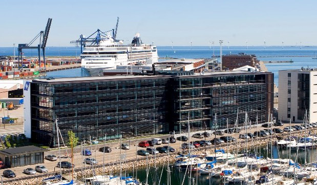 DFDS' hovedkontor